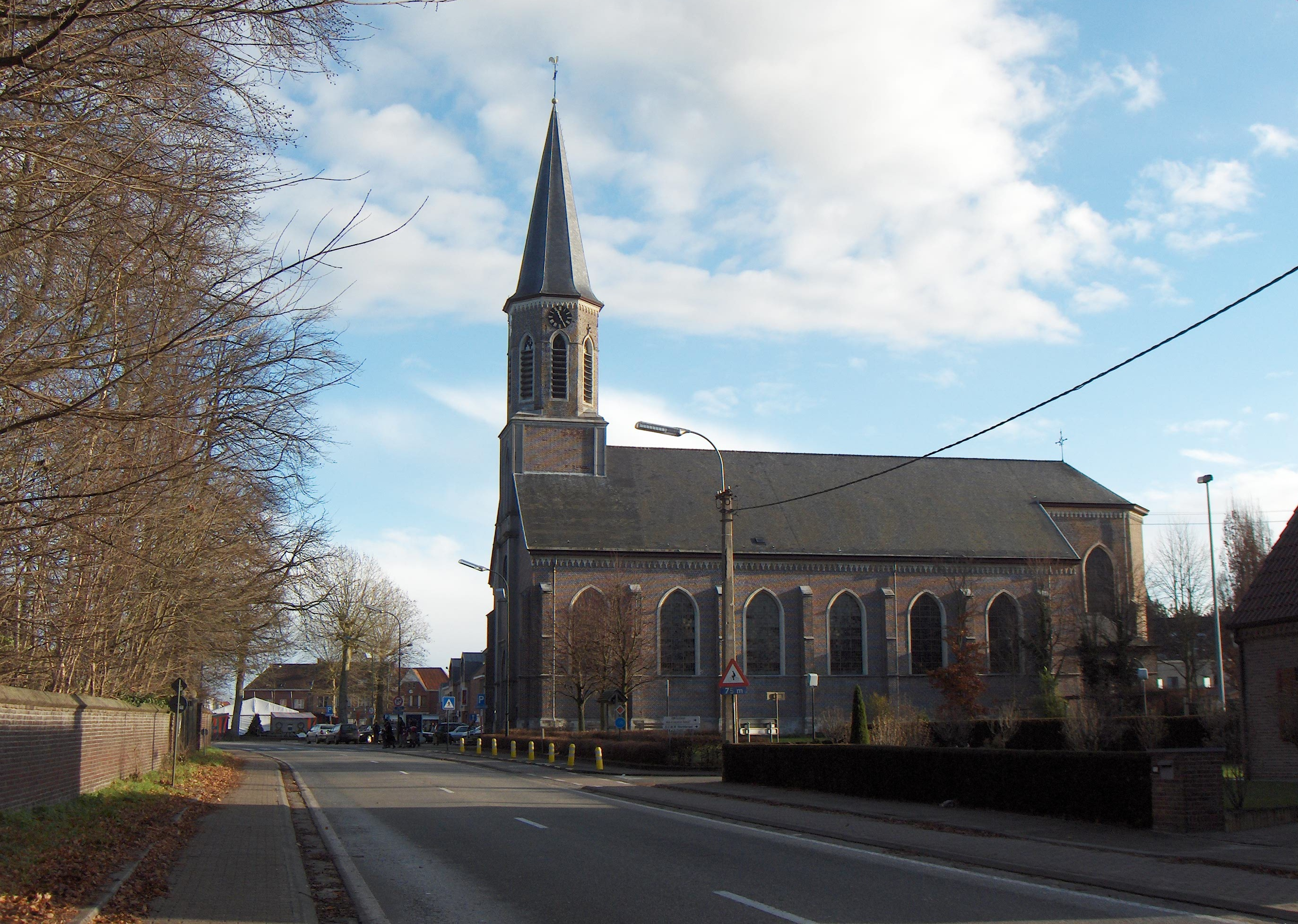 Heusden (Ortsteil der Gemeinde Destelbergen, Belgien, Prov. Ostflandern), Dorfmitte mit Kreuzkirche (Heilig-Kruiskerk). Blick von Süden